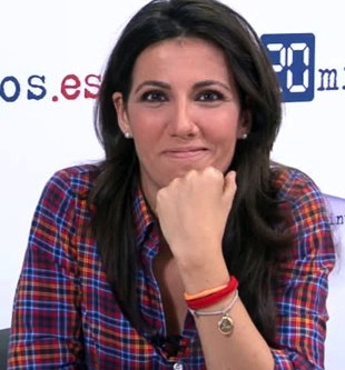 La periodista Ana Pastor, durante una entrevista digital con los lectores del diario 20 minutos.